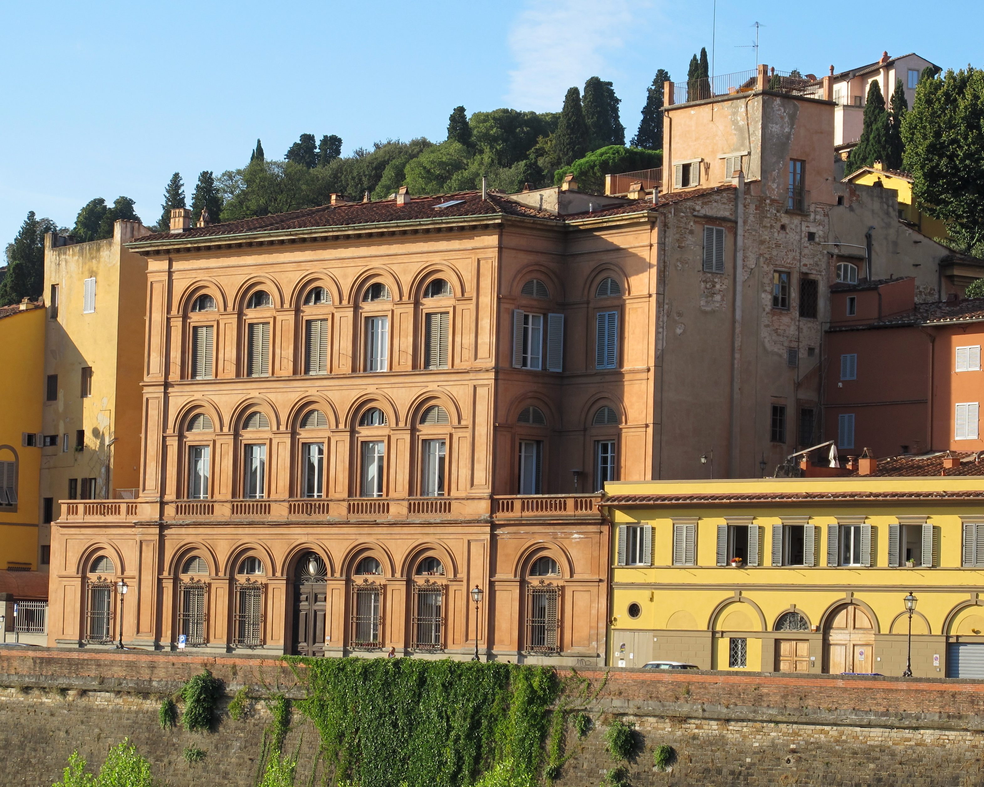 Via de' Bardi, Firenze